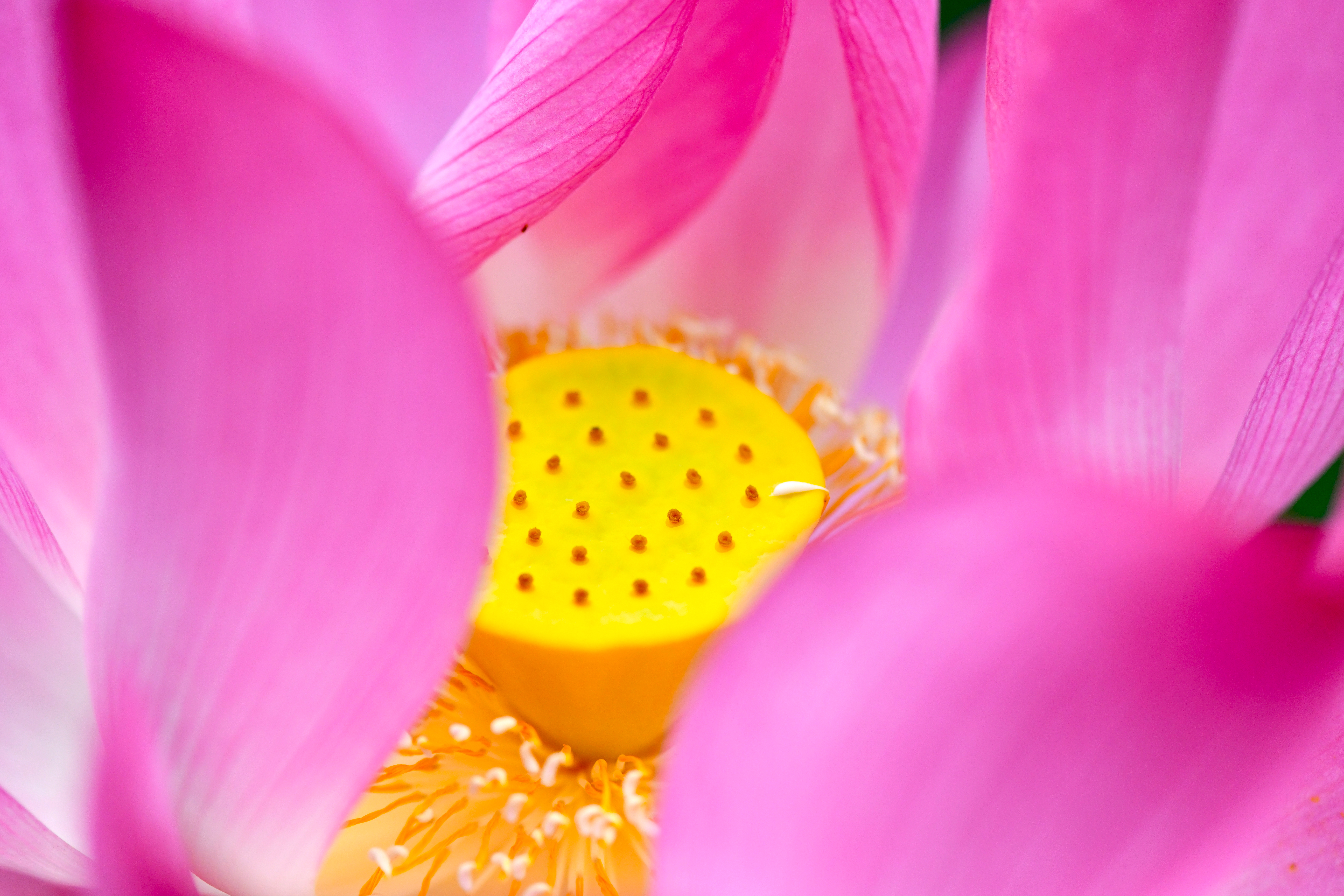 บัวหลวง ที่อุทยานแห่งชาติเขาใหญ่ อ่างเก็บน้ำ